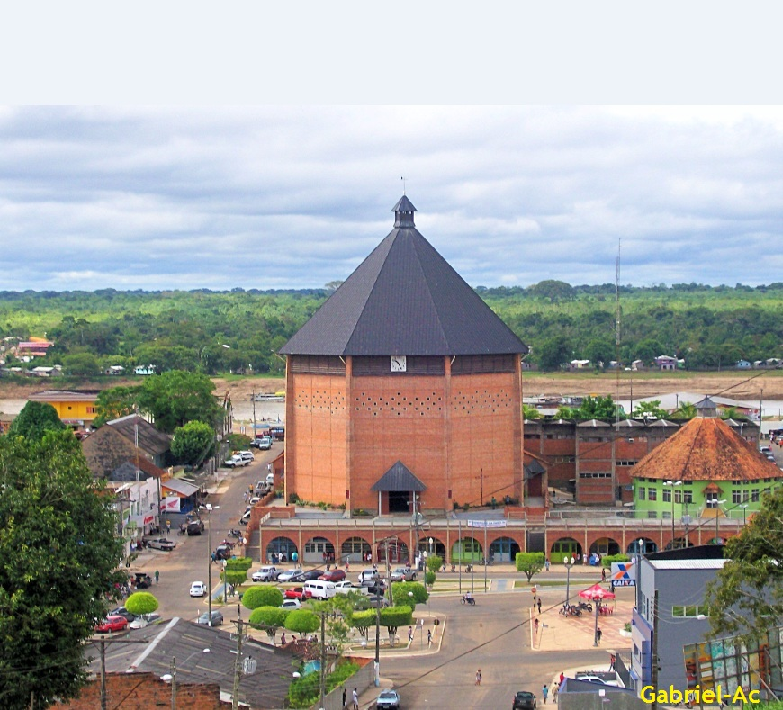 Catedral de Nossa Senhora da Glória - Cruziero do Sul - Acre